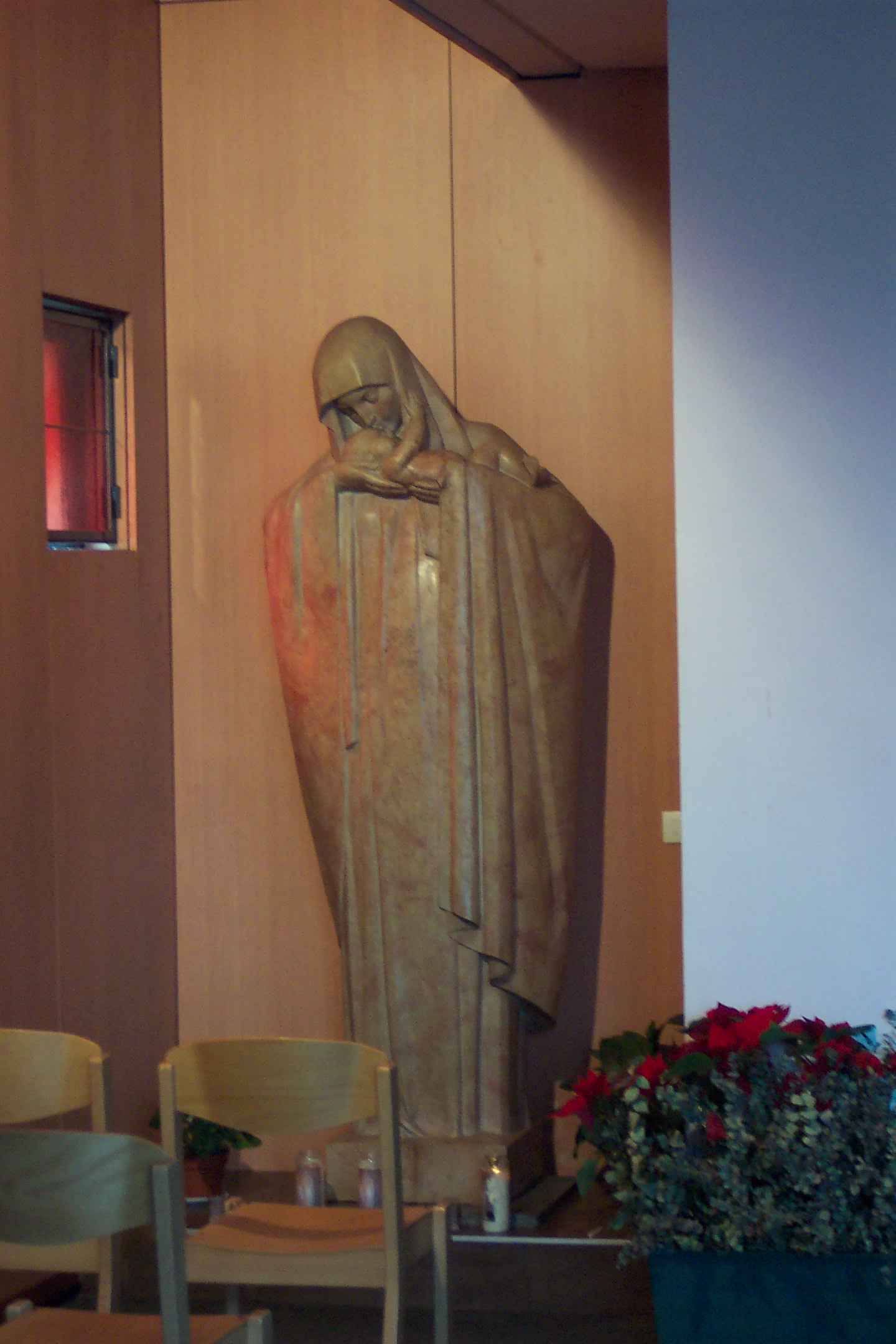 Lucienne Heuvelmans (1881-1944), Vierge à l'enfant, 1928, pierre, Paris, église Notre-Dame-d'Espérance.